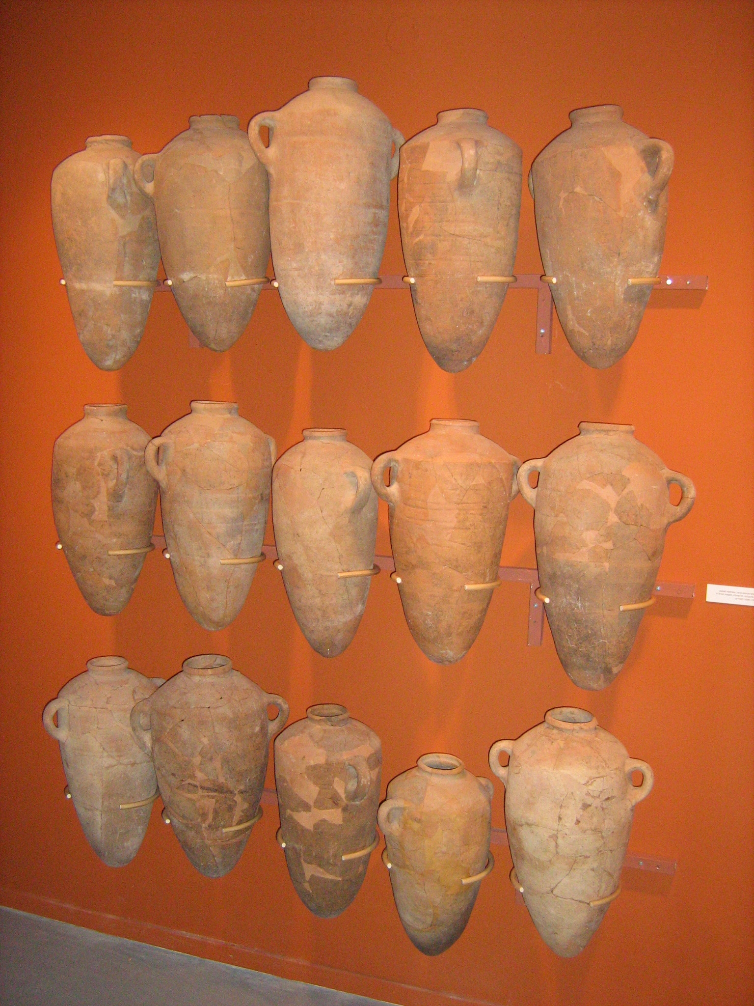 תל קסילה אמפורות מהתל בתערוכת 20,000 שנות היסטוריה לתל אביב